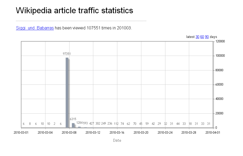 Abrufstatistik für "Siggi und Babarras" auf der deutschsprachigen Wikipedia im März 2010. Die Grafik belegt die Nutzung von Wikipedia als Second Screen: In der Wer wird Millionär-Sendung vom 8.3.2010 lautete die 1-Million-Euro-Frage: „Welches Duo erlebt in Deutschland als Siggi und Babarras seine ersten Abenteuer?“.